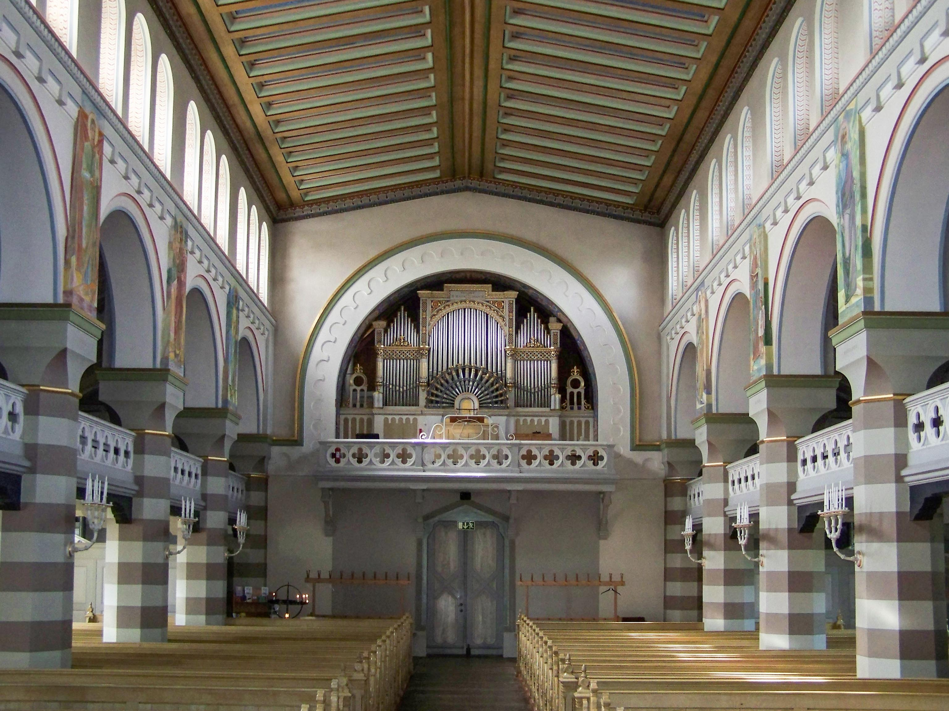 Bräkne-Hoby,_Kirche_Gang, Empore mit Orgel